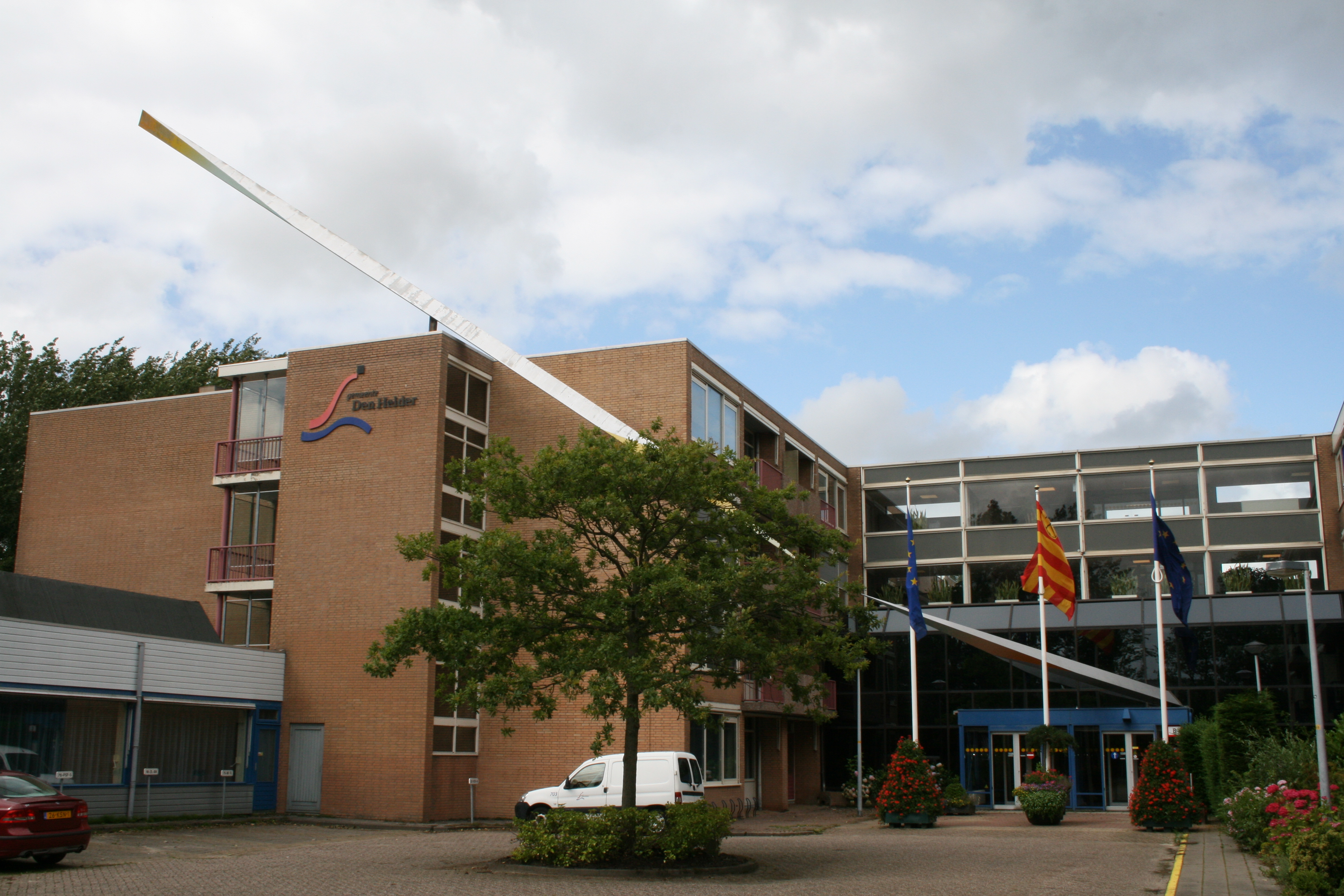 Kunst op het stadhuis van Den Helder